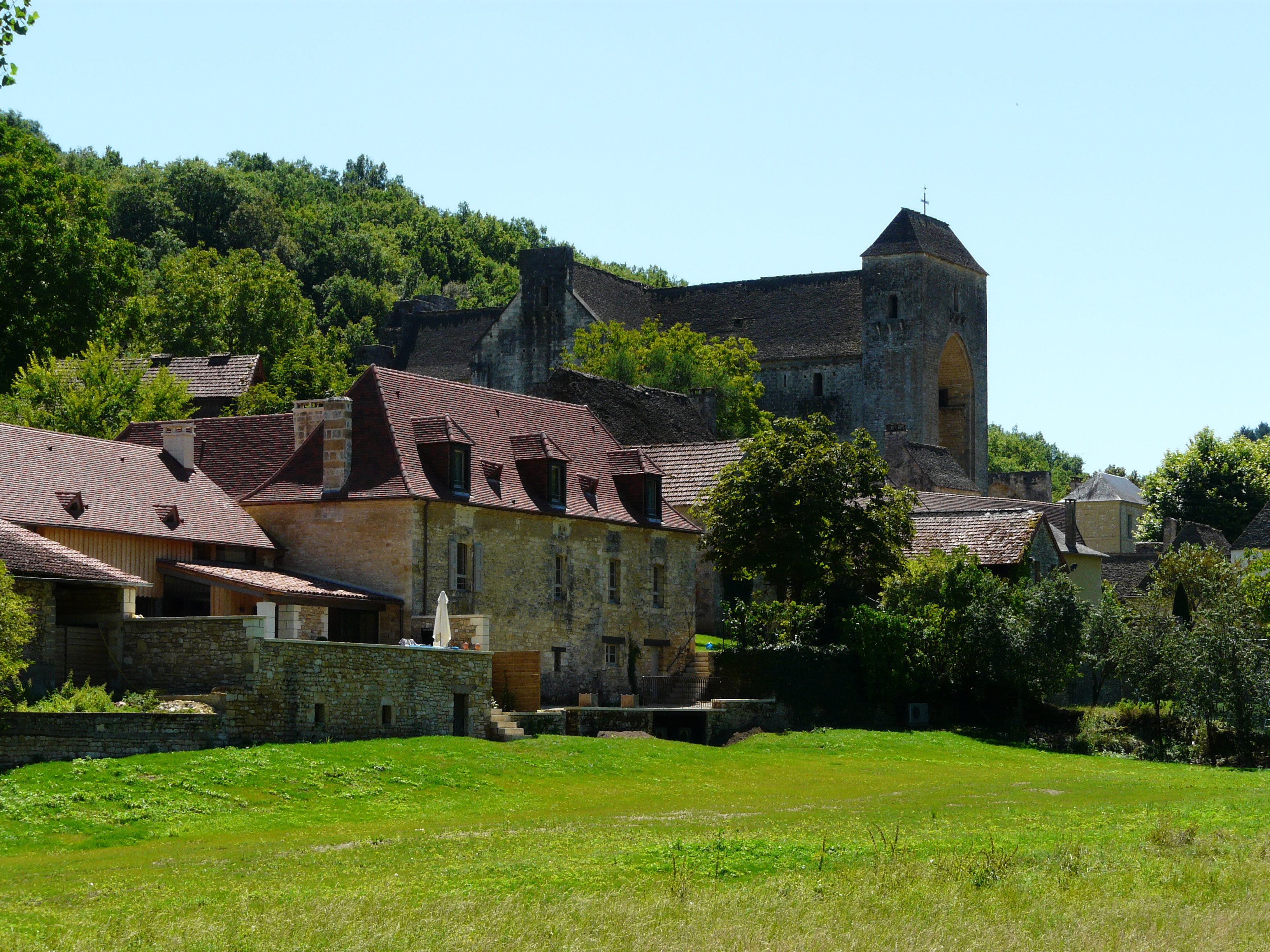 Dominé par l'imposante masse de son église, le village de Saint-Amand-de-Coly, Dordogne, France